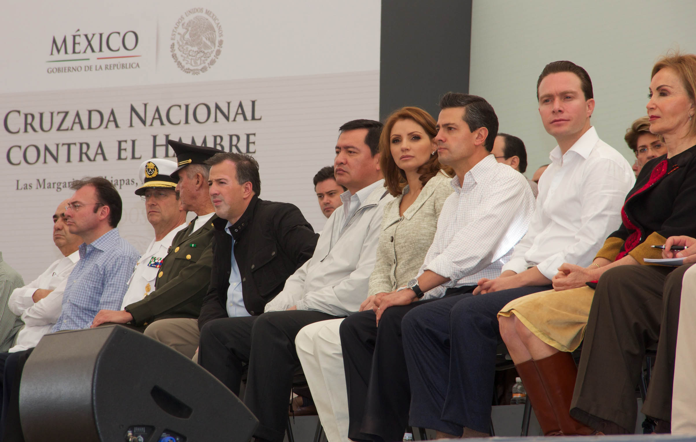 Cruzada Nacional Contra el Hambre. Las Margaritas, Chiapas. 21 enero 2013